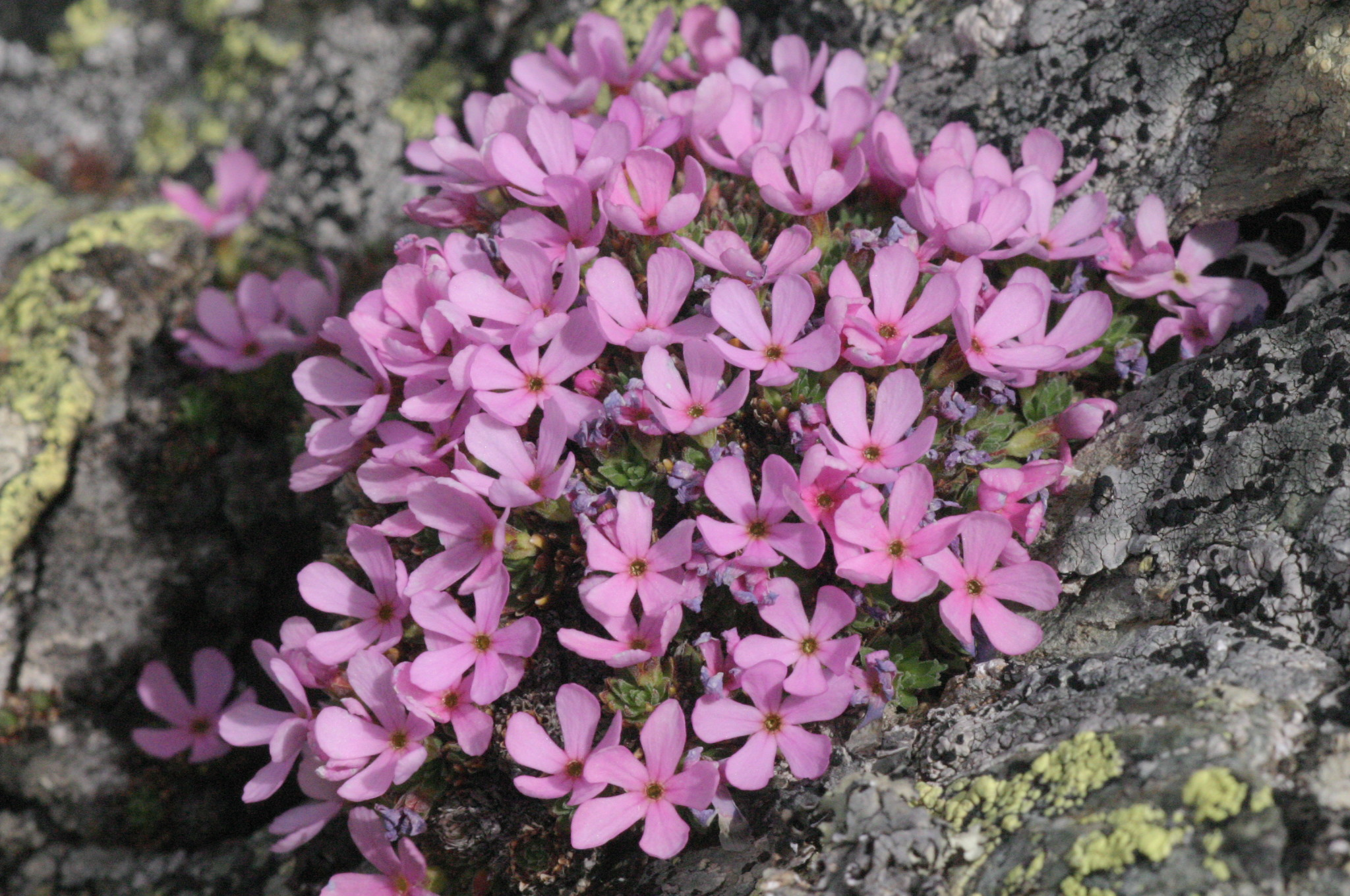 Androsace wulfeniana (Wulfen-Mannsschild) Aufnahmeort: Nockberge, Kärnten, Austria